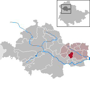 Urleben in Thuringia - Unstrut-Hainich-Kreis